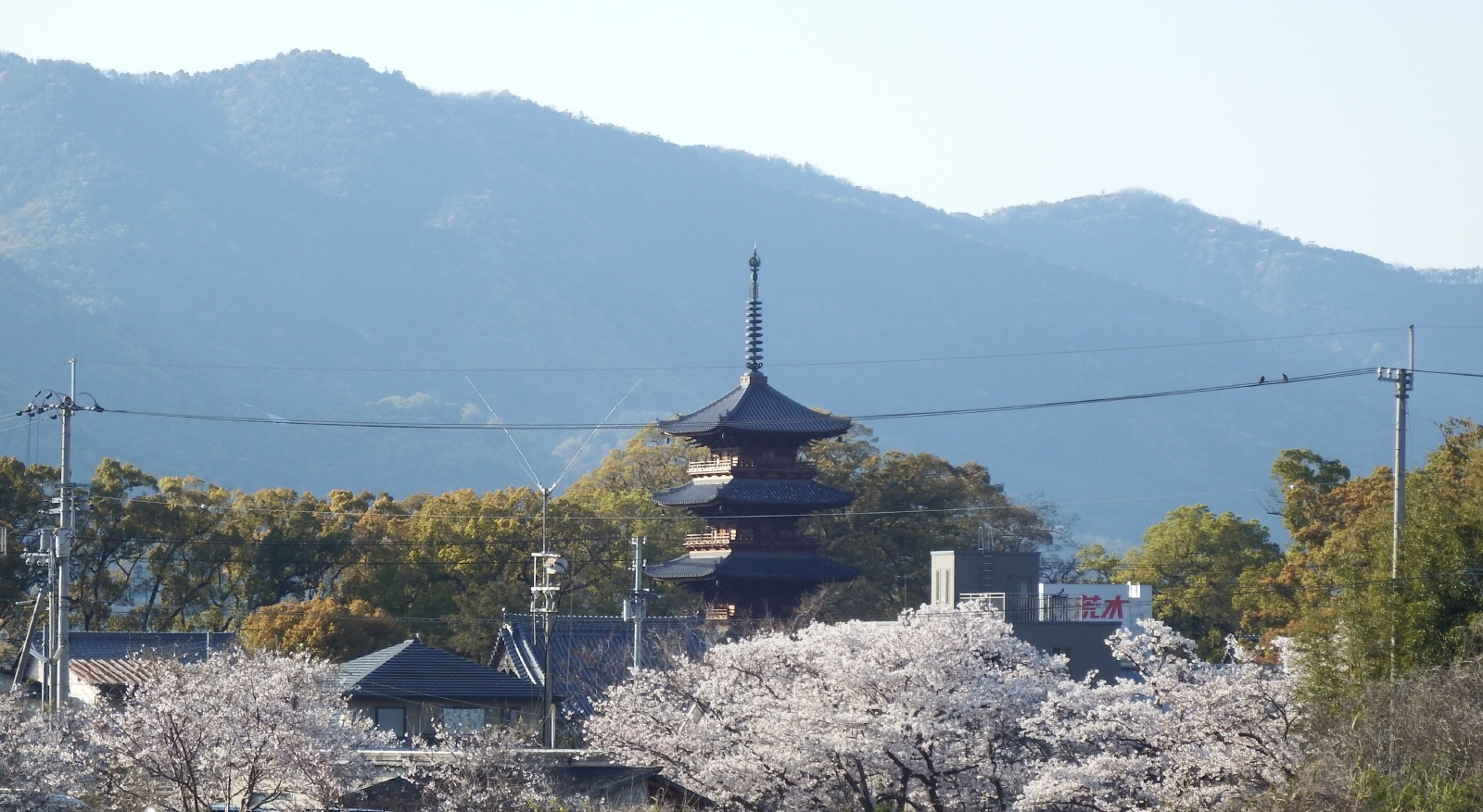 本山寺の遠景